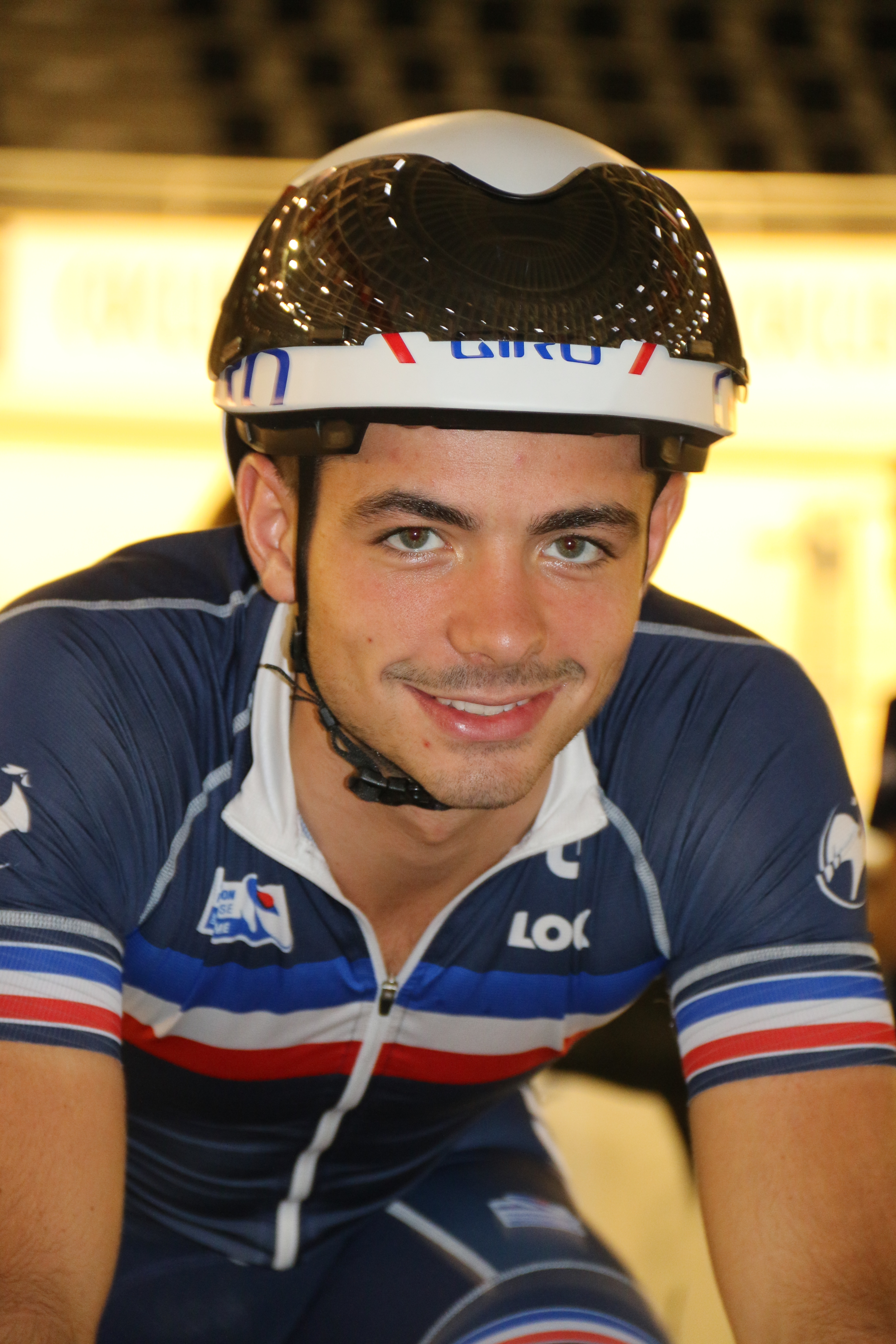 Florian Maitre, französischer Radsportler